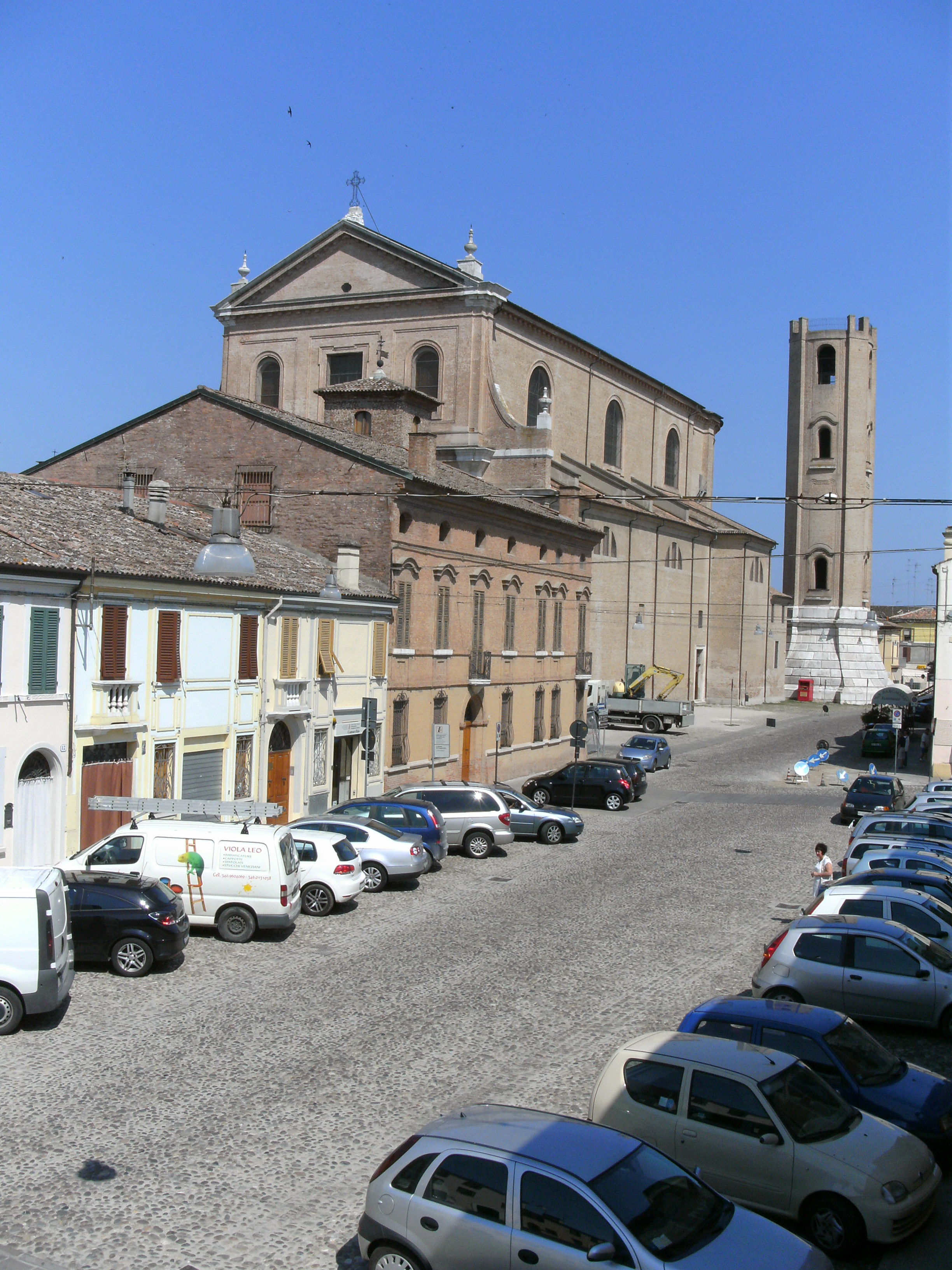 Dom der Stadt Comacchio (Kathedrale S. Cassiano, Provinz Ferrara, Region Emilia Romagna) in Oberitalien, von Südwesten aus gesehen (Eingangstür ist von der Häuserfront auf der linken Straßenseite verdeckt)